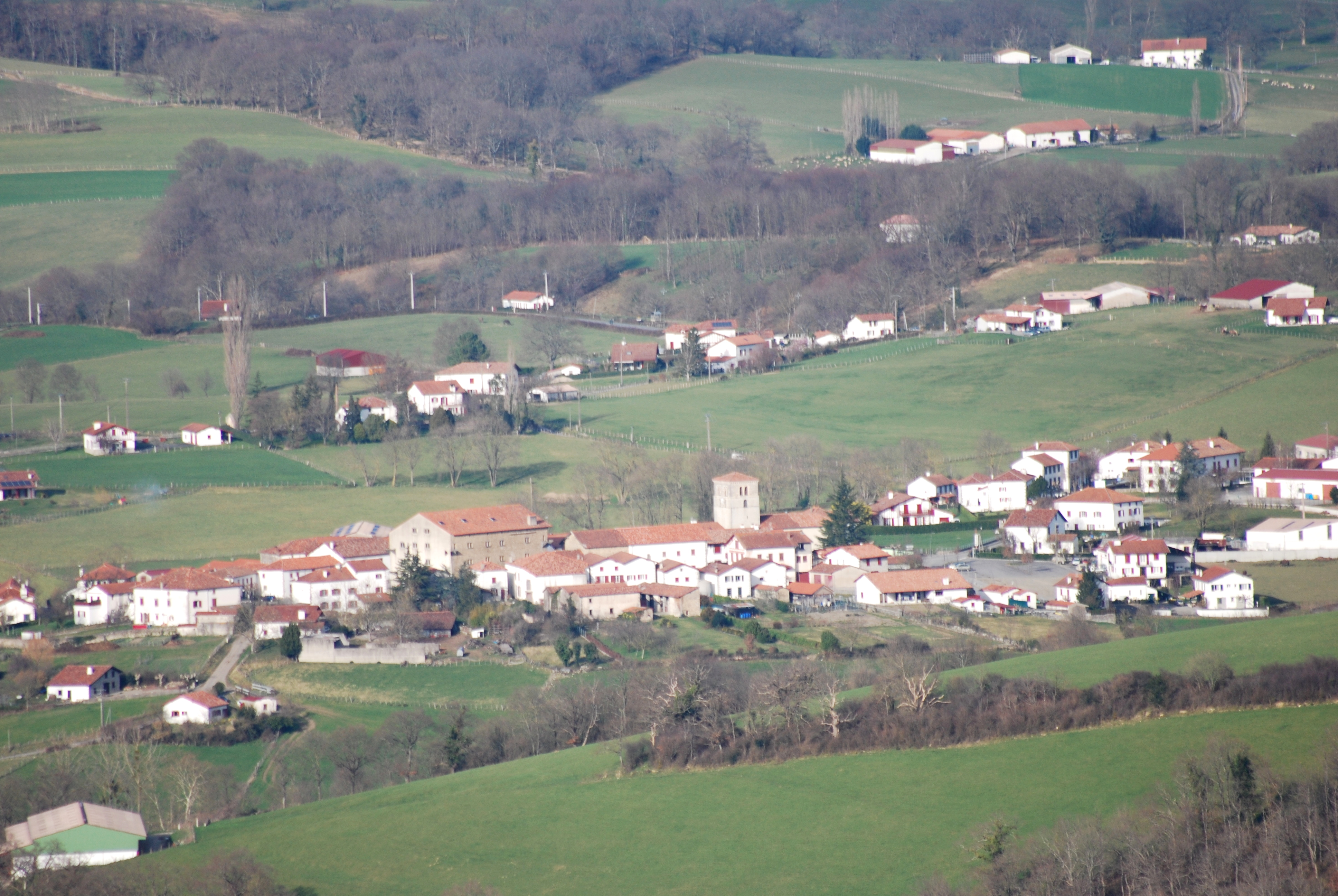 Vue d'Irissary.